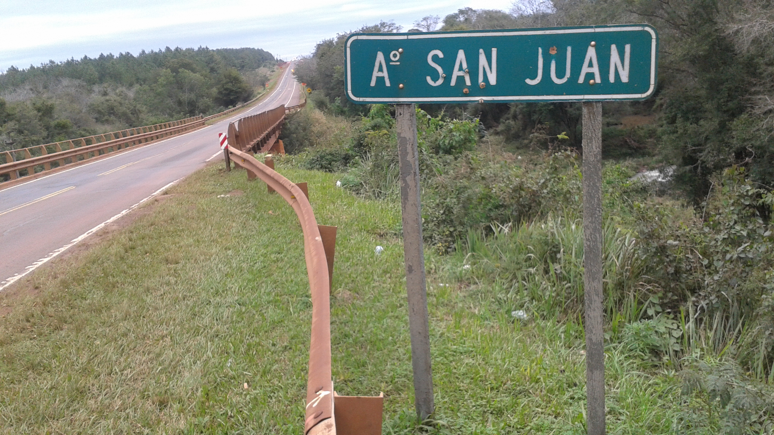 Arroyo San Juan - Departamento Candelaria (Provincia de Misiones, Argentina).